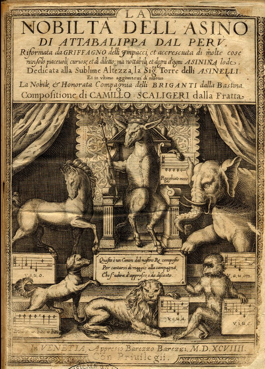 title page of "Nobilta dell'asino" (Adriano Banchieri)